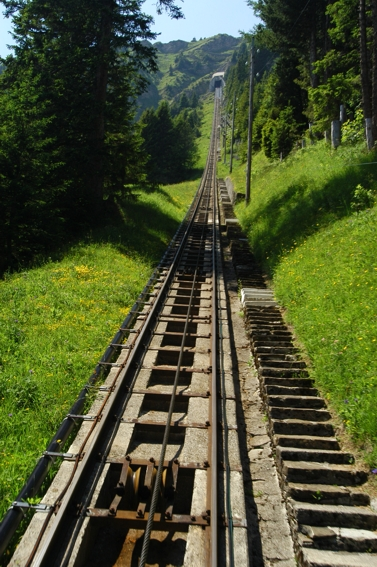 Bildbeschreibung: Blick aus der steilen Niesenbahn, erbaut 1907 Quelle: Stefan Grünig, Privatarchiv Fotograf: Bild von Stefan Grünig, CH-3752 Wimmis (Benutzer:Sgruenig) Datum: Juni 2005